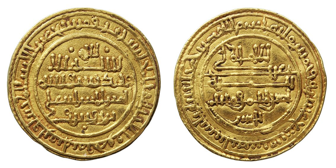 DinarDinar d'or encunyada a Sevilla sota Alí ibn Yússuf. Any 519 de l'Hègira.